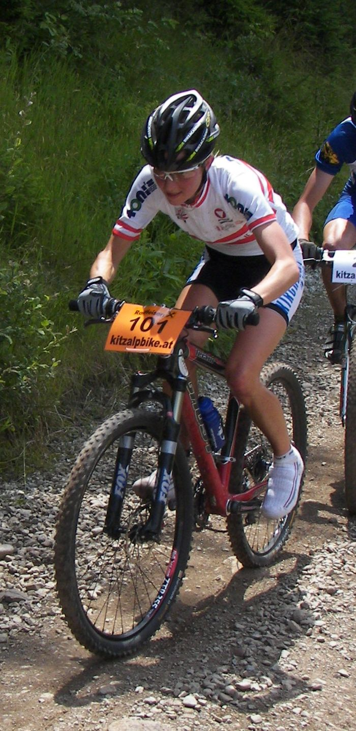 Elisabeth Osl bei 'Kitzalpbike' Cross Country Rennen 2007 in Kirchberg in Triol